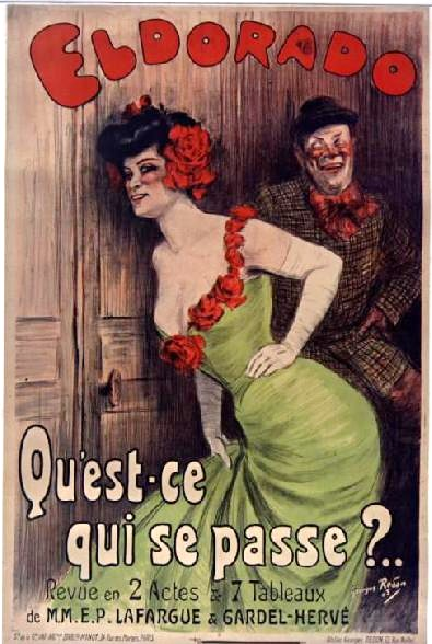 Eldorado Qu'est-ce qui se passe ?, affiche de Georges Redon, imprimerie Minot.